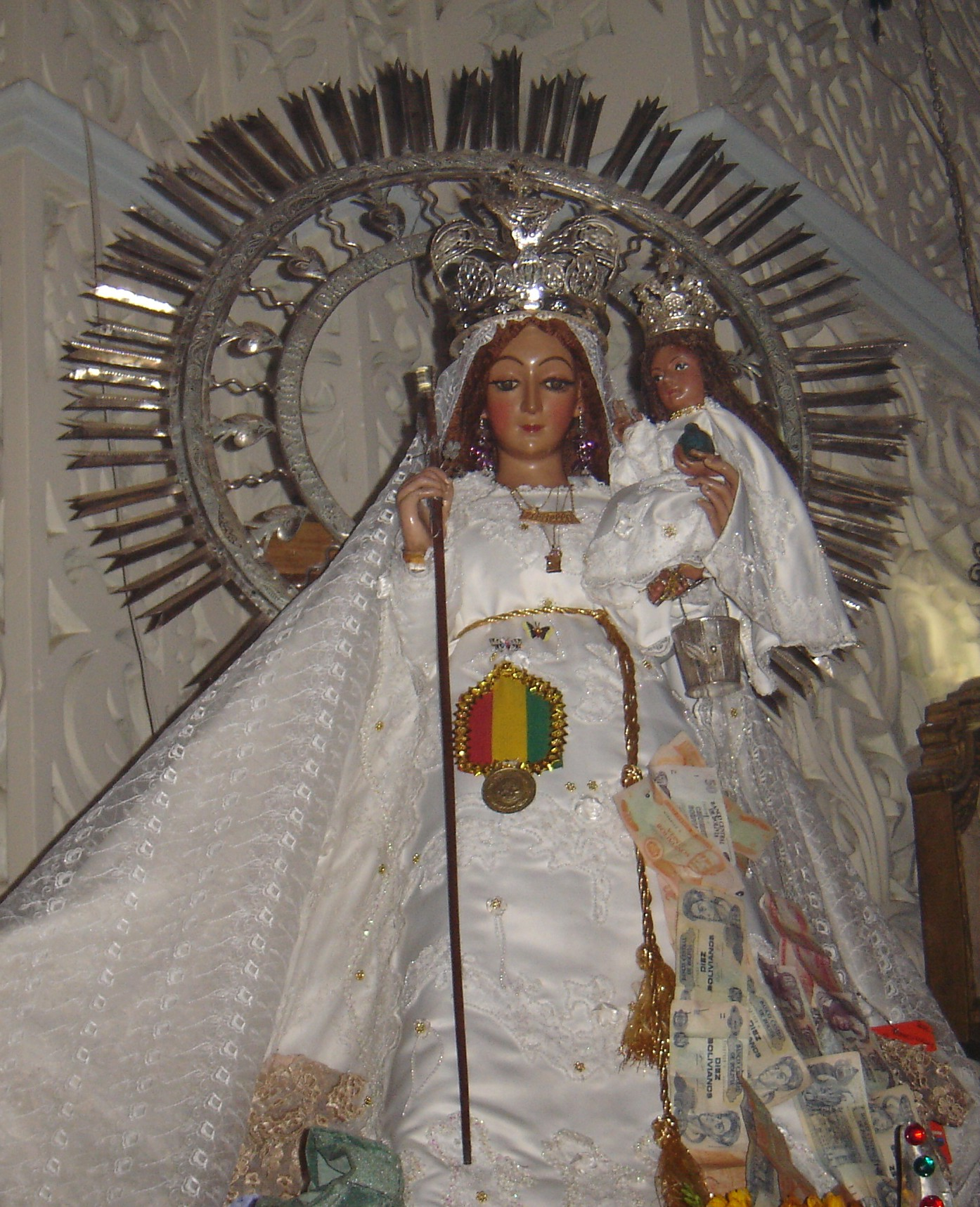 Runa Simi: Qullana K'acha Mama, Jarani llaqtapi willkachasqa, Qhuchapampa, Wuliwya suyupi.